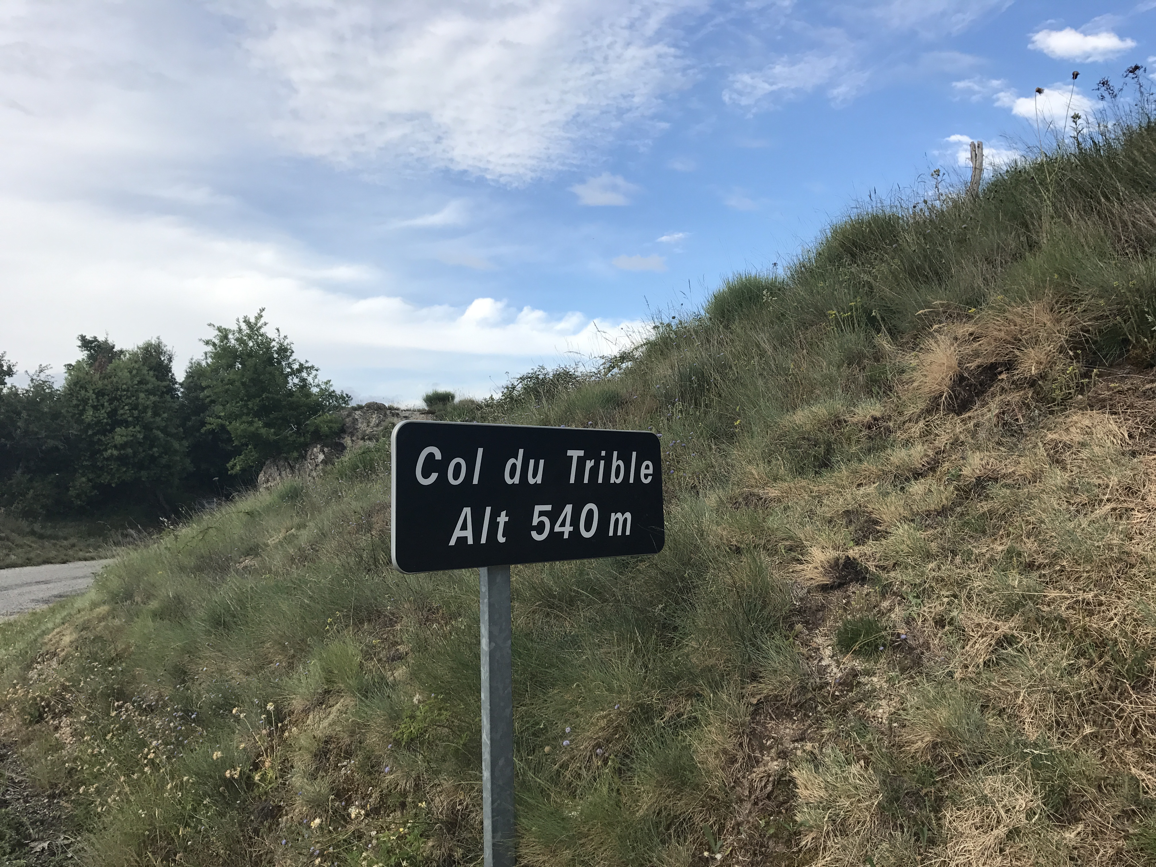 Panneau du Col du Trible situé à 540 m d'altitude sur la commune de Saint-Cierge-la-Serre.